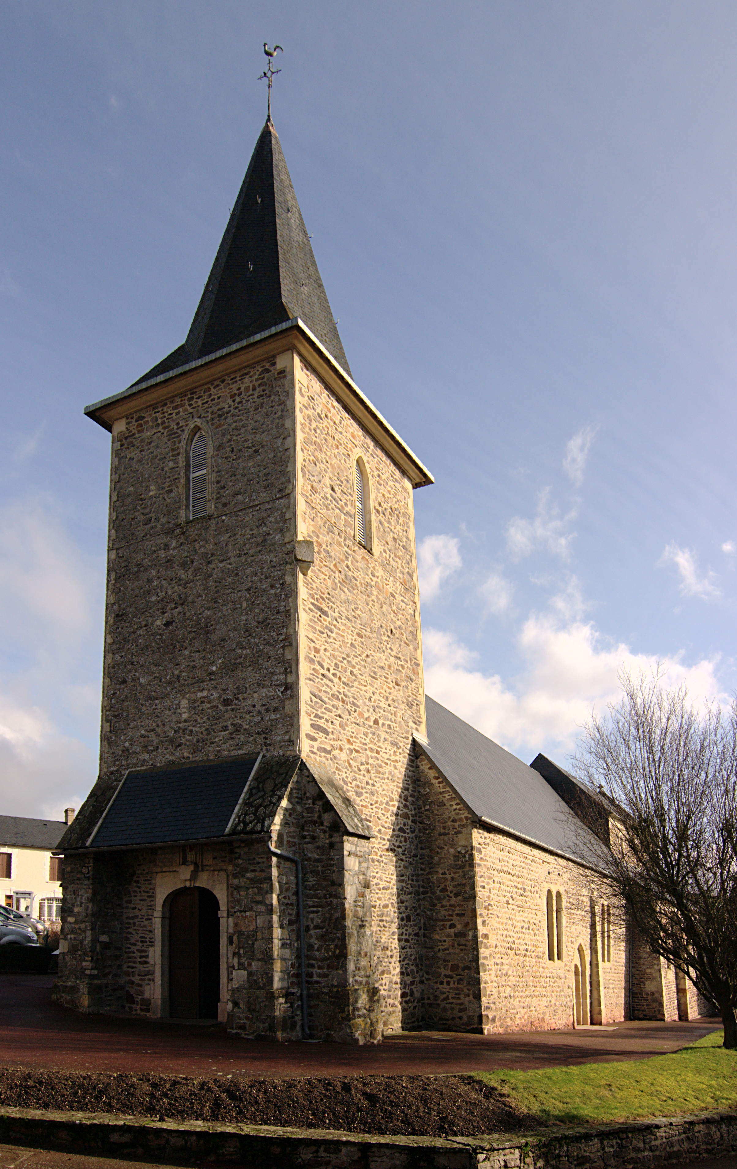 Église Saint-Martin de Saint-Martin-de-Sallen (Calvados, France).